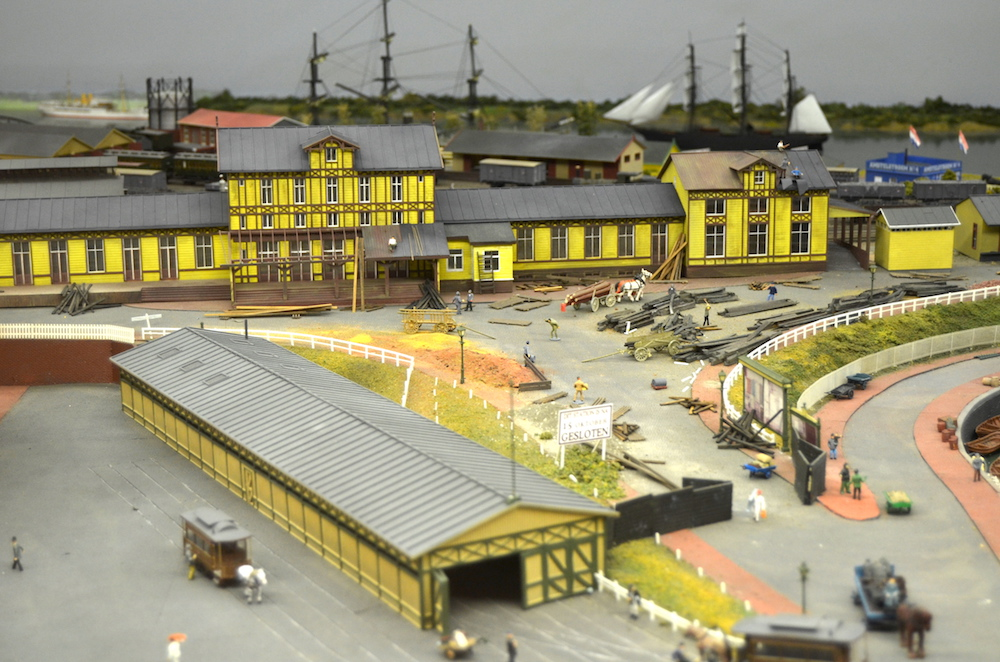 Nederlands Spoorwegmuseum Maquette omgeving Amsterdam Centraal Station - Station Droogbak; 1889. Foto: Erik Swierstra.